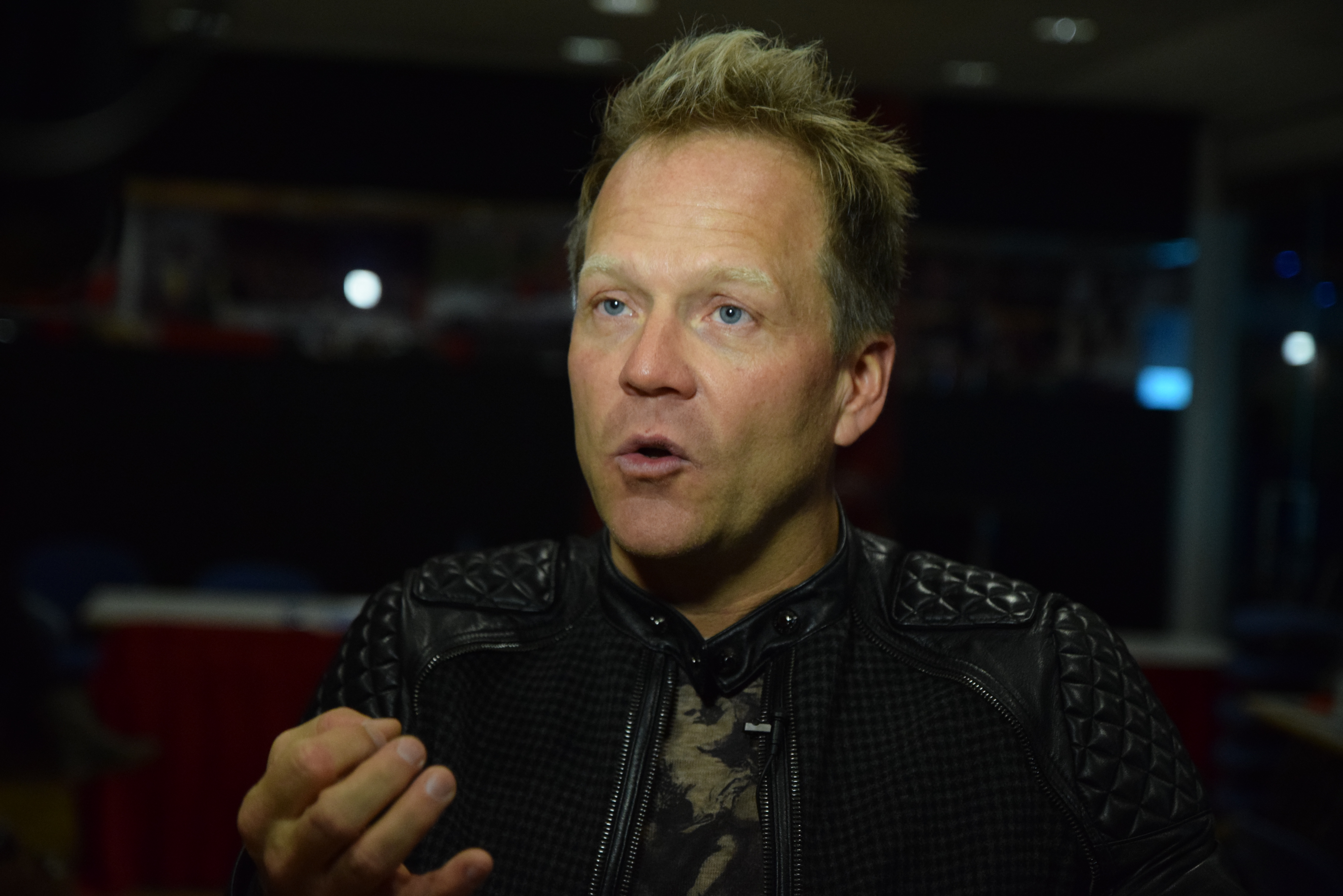 Leo Bigger, Willow Creek Leitungskonferenz 2016, Hannover